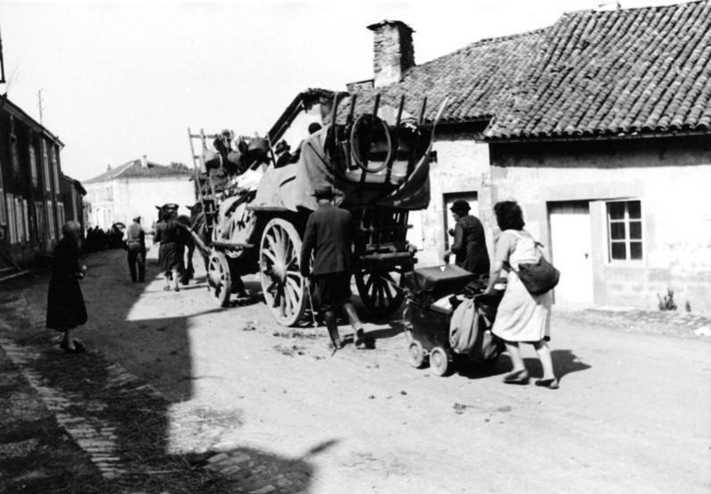 Flüchtlinge in Dainville